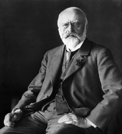 František Topič (1858 - 1936), Český nakladatel, vydavatel a knihtiskař.